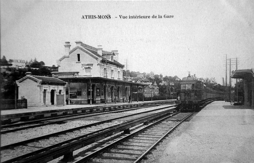 La gare d'Athis-Mons après le doublement des voies et le remplacement de l'ancien bâtiment par un nouveau suivant un modèle type de la compagnie du PO pour les gares construites ou reconstruites après le doublement de la ligne et son électrification par un troisième rail. Le train est à traction électrique.